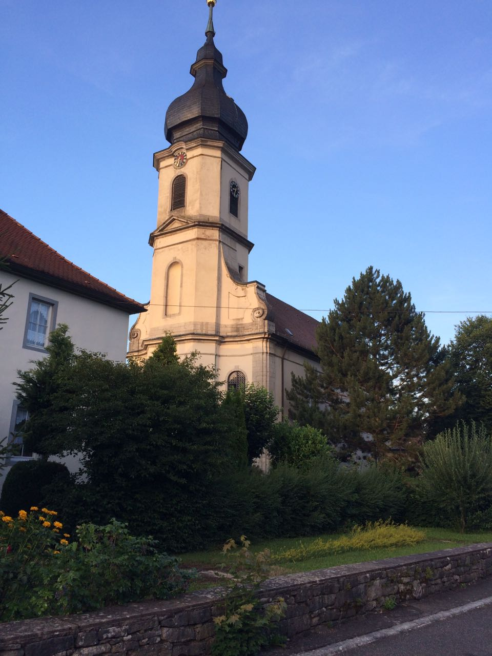 Kirchgasse 4